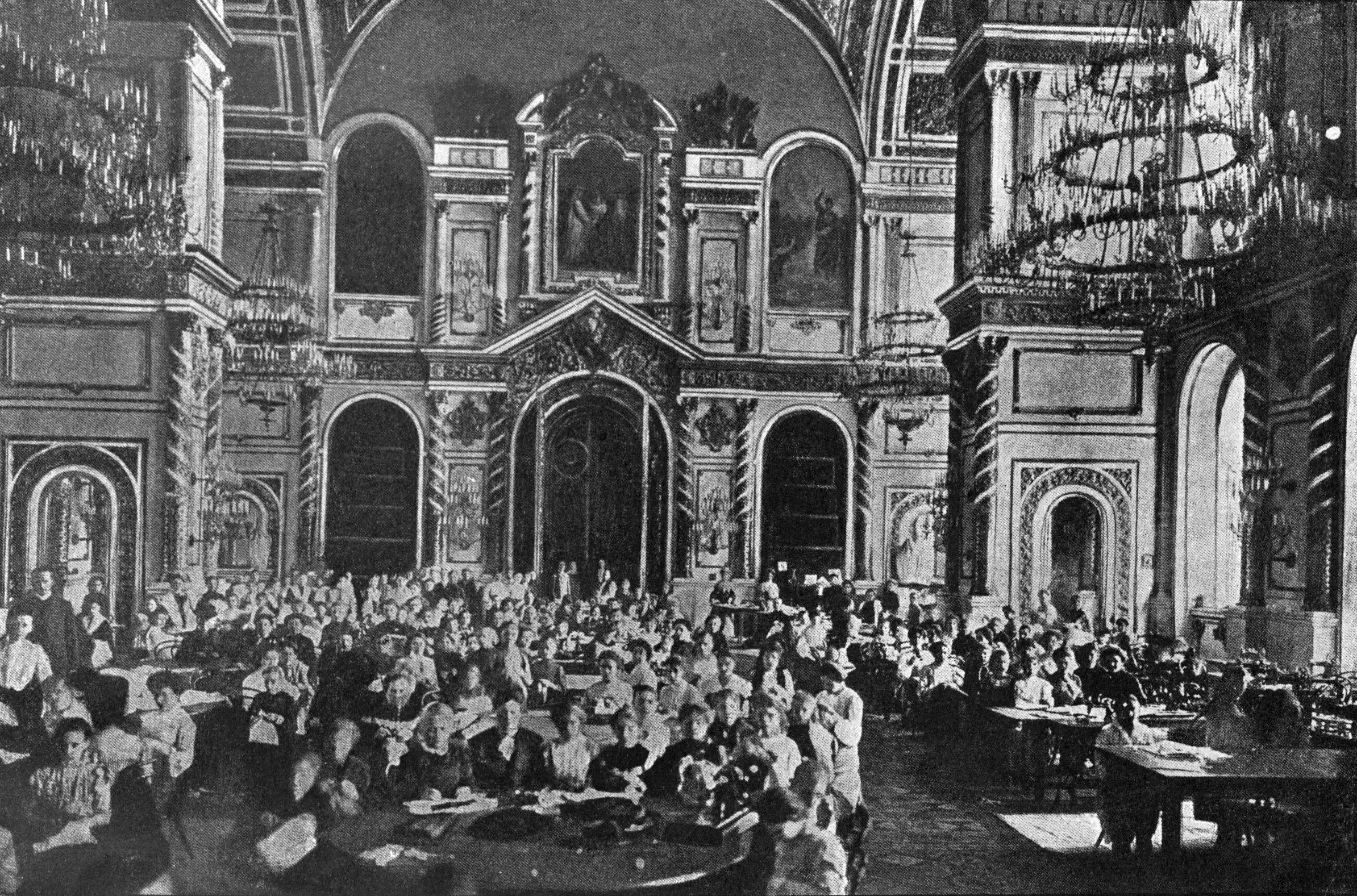 Швальня в залах Кремлевского Дворца во время русско-японской войны